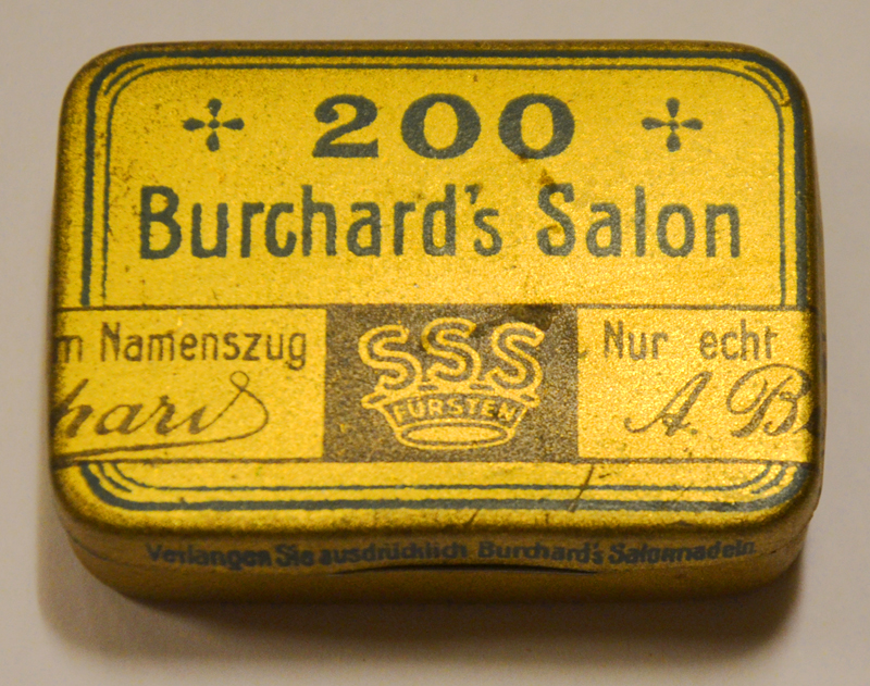 Am Abend des 4. Januar 2017 spontan gemeinschaftlich im Wikipedia-Büro Hannover aufgenommen (in einer für Makro-Aufnahmen bisher lediglich "ausreichenden" Situation): Kleine lithographisch bedruckte Blechdose für 200 Grammophonnadeln der Marke „Buchard's Salon“ von der späteren Firma „Drei-S-Werk Präzisionswerkzeuge GmbH & Co. Fertigungs KG“ mit einem Porträt und dem Namenszug des russischen Erfinders August Burchardt. Aufgeklappt erläuterte der Eindruck im Deckel: „“ Zudem enthielt die Dose einen Beipackzettel ...